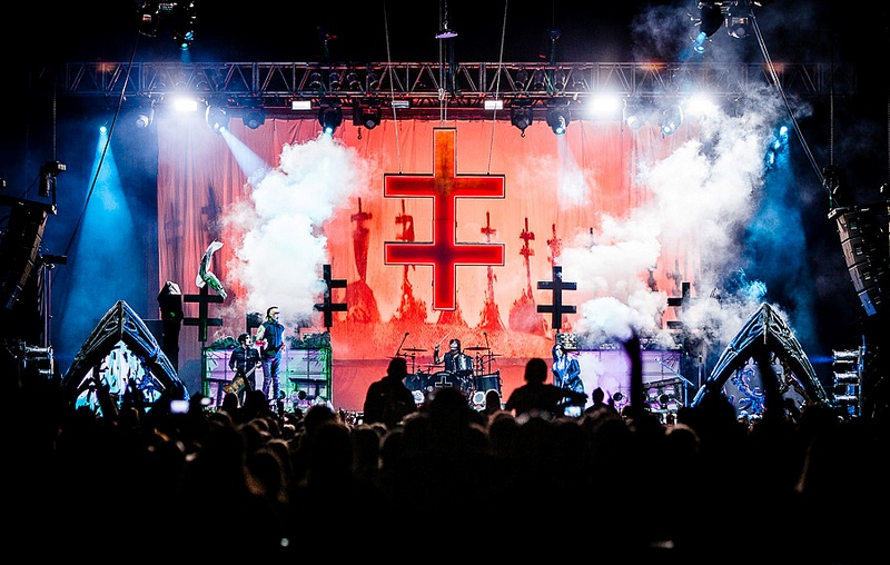 Marilyn Manson en vivo en un recital en Moscow en 2012, presentando Born Villain en la gira Hey Cruel World.. Tour. La foto fue tomada por Valery Latypov que me dio permiso para editarla y usarla en Wikipedia.